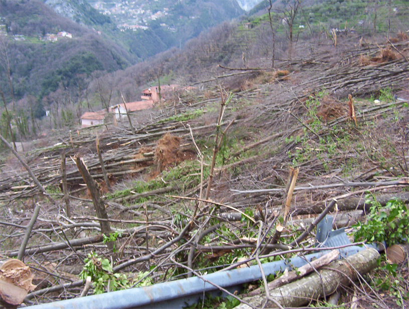 Aldo Parisi, opera propria, 10 aprile 2005, Una tromba d'aria si abbatte sul paese di Altagnana e la "via dei Carri" scompare sotto tonnellate di castagni sradicati, pubblico dominio